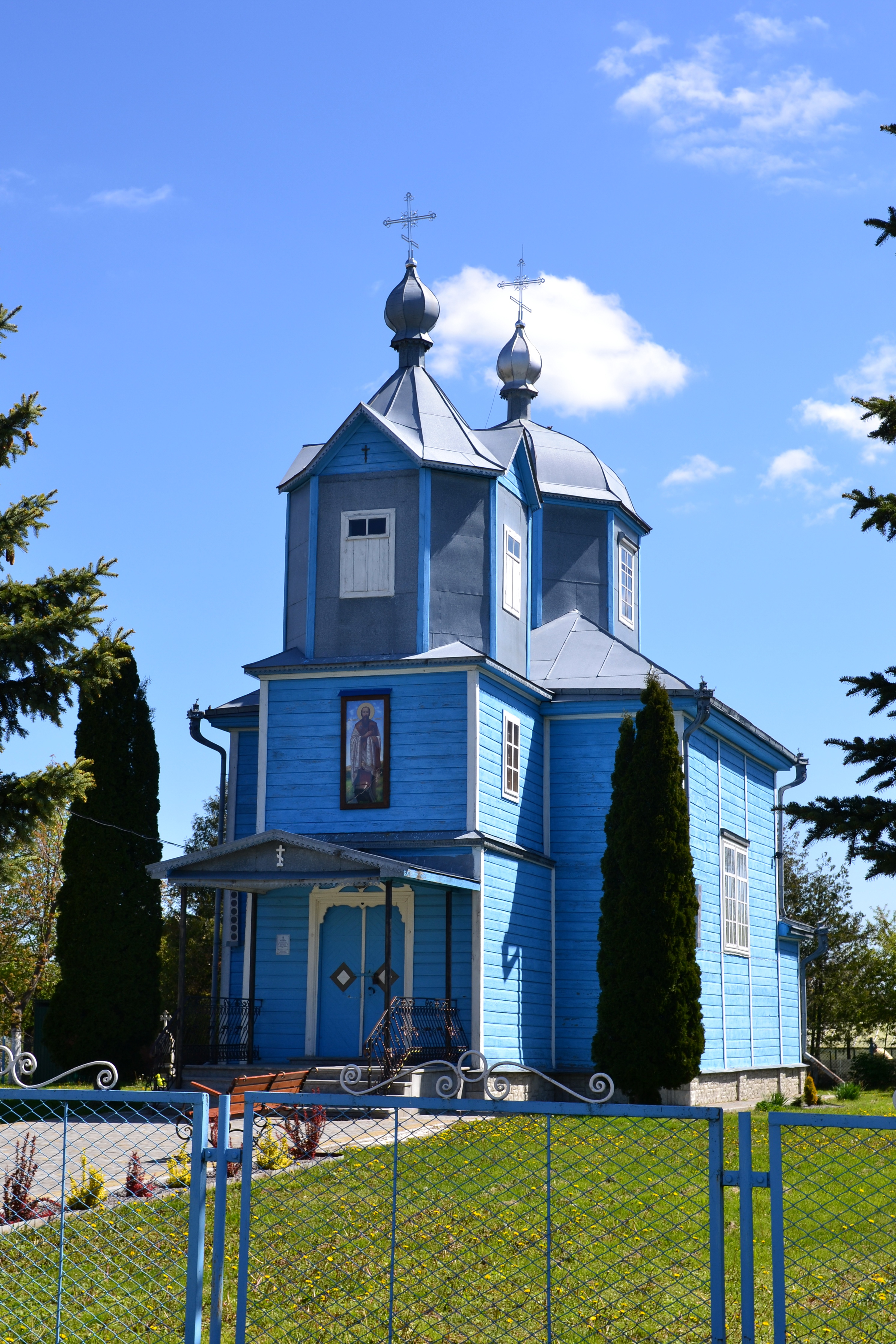 Василівська церква (дер.) (1883 рік) - вигляд з південного заходу - Боголюби (вул. Лесі Українки) Луцький район Волинська область Україна